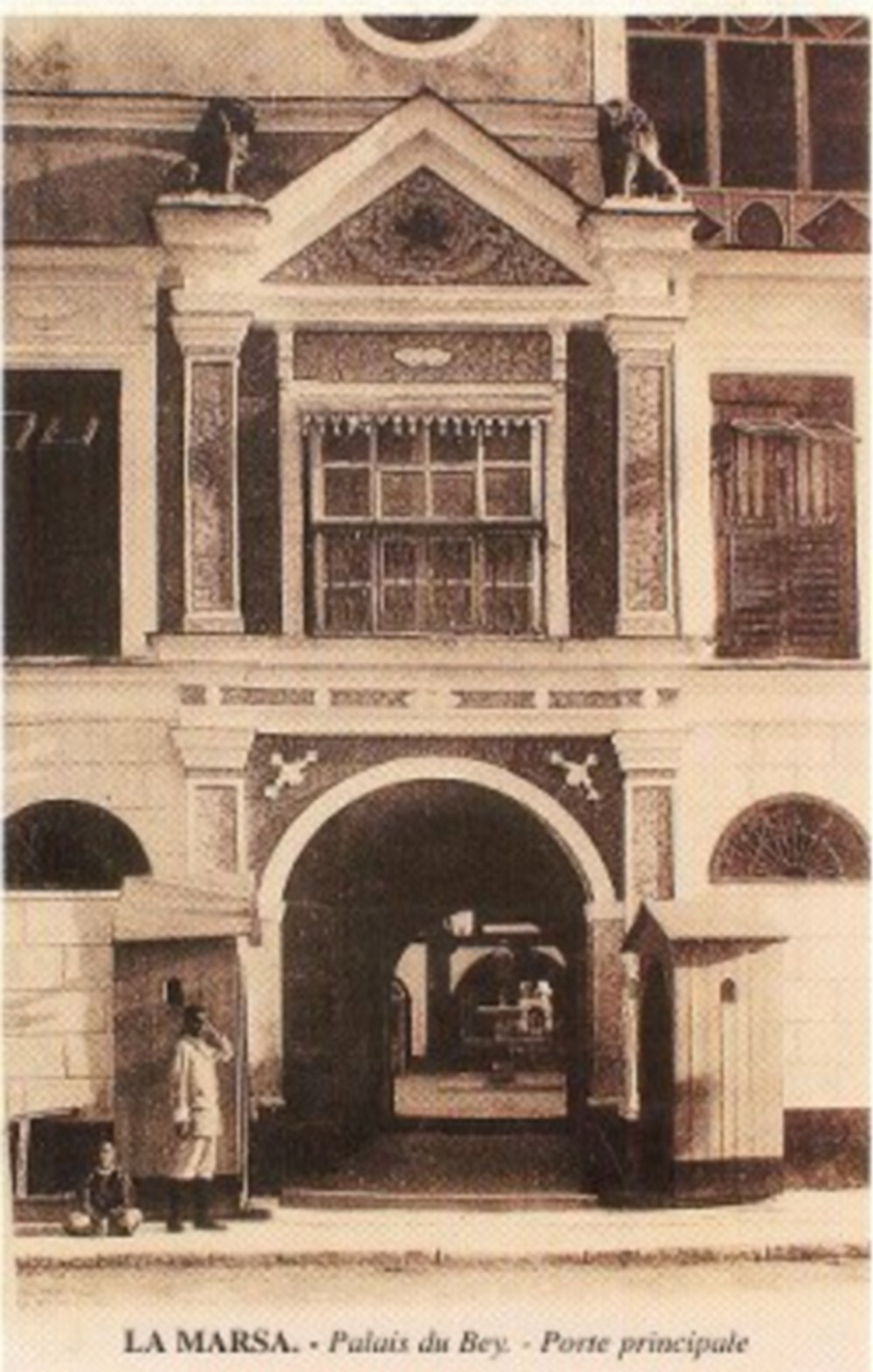 Porte principale du palais du Bey à la Marsa, Tunisia